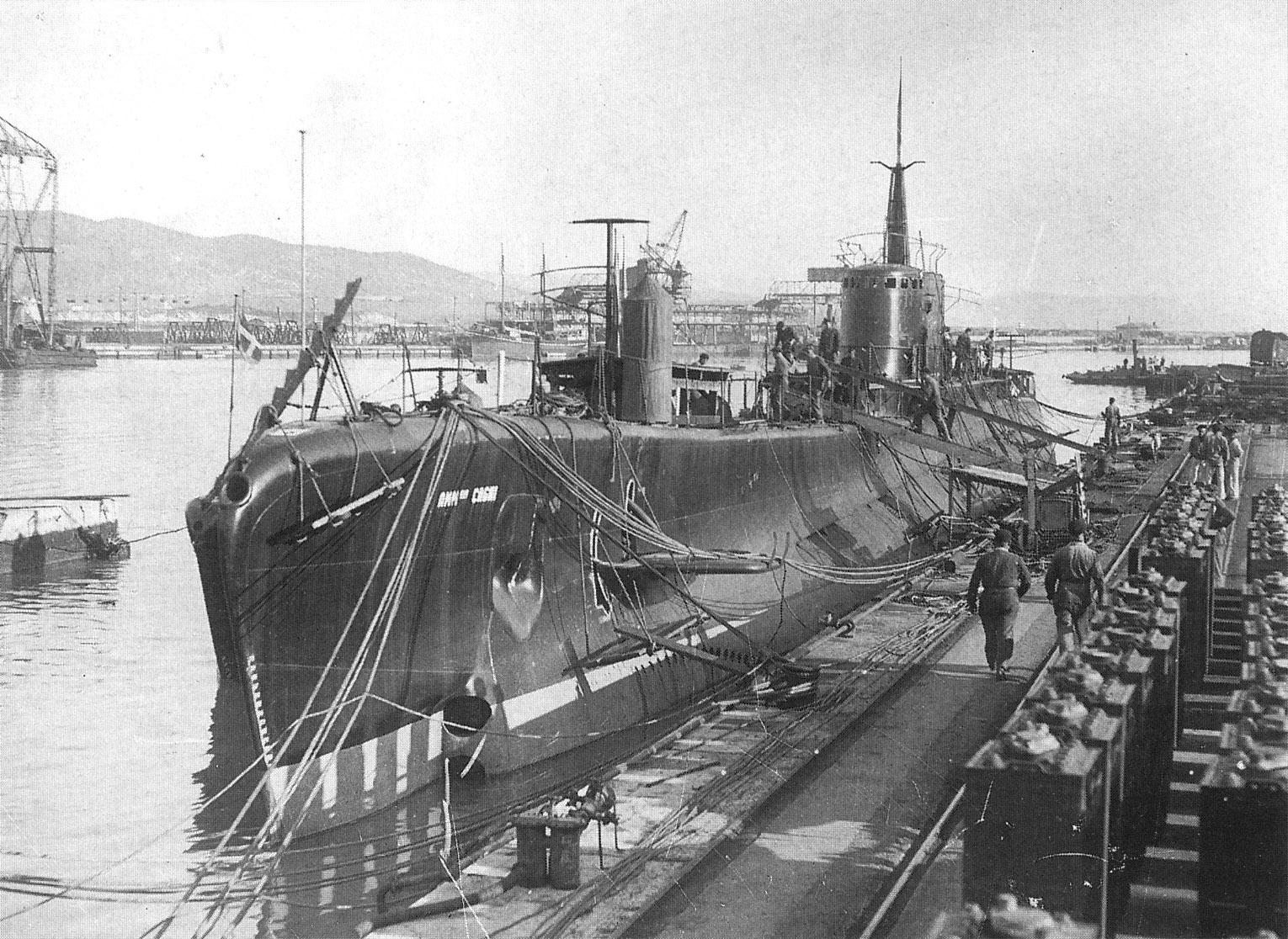 Sommergibile Cagni alla banchina lavori del cantiere di Monfalcone. A terra sono allineati gli accumulatori della batteria pronti per essere imbarcati.